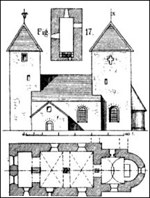 Skizze der Kirche von Alböke, Lithographie